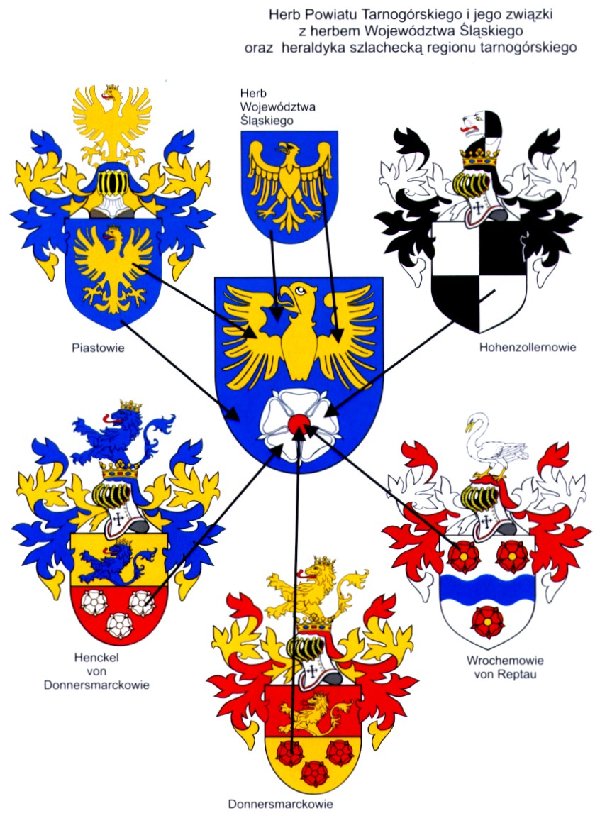 Związki herbu powiatu tarnogórskiego z herladyką samorządową i szlachecką ziemi tarnogórskiej (opr. AK-P) Jestem autorem tej grafiki (moje godło zgodnie ze zwyczajem zamieściłem na grafice). Zgadzam się na jej wykorzystanie w wikipedii, bo też i sam ją tam osobiście umieściłem, jako ilustrację do artykułu, którego pierwszą wersję popełniłem. Pozdrawiam --AK-P 12:53, 17 paź 2005 (CEST)